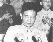 1953年7月1日，朱德、廖承志（右）出席全国第二次青年团代表大会时在主席台上。左为胡耀邦。